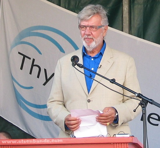 Morten Grunwald hält seine Rede zur Enthüllung der neuen Olsenbanden-Silhouette in Thisted während des Olsenbanden-Events 2006.